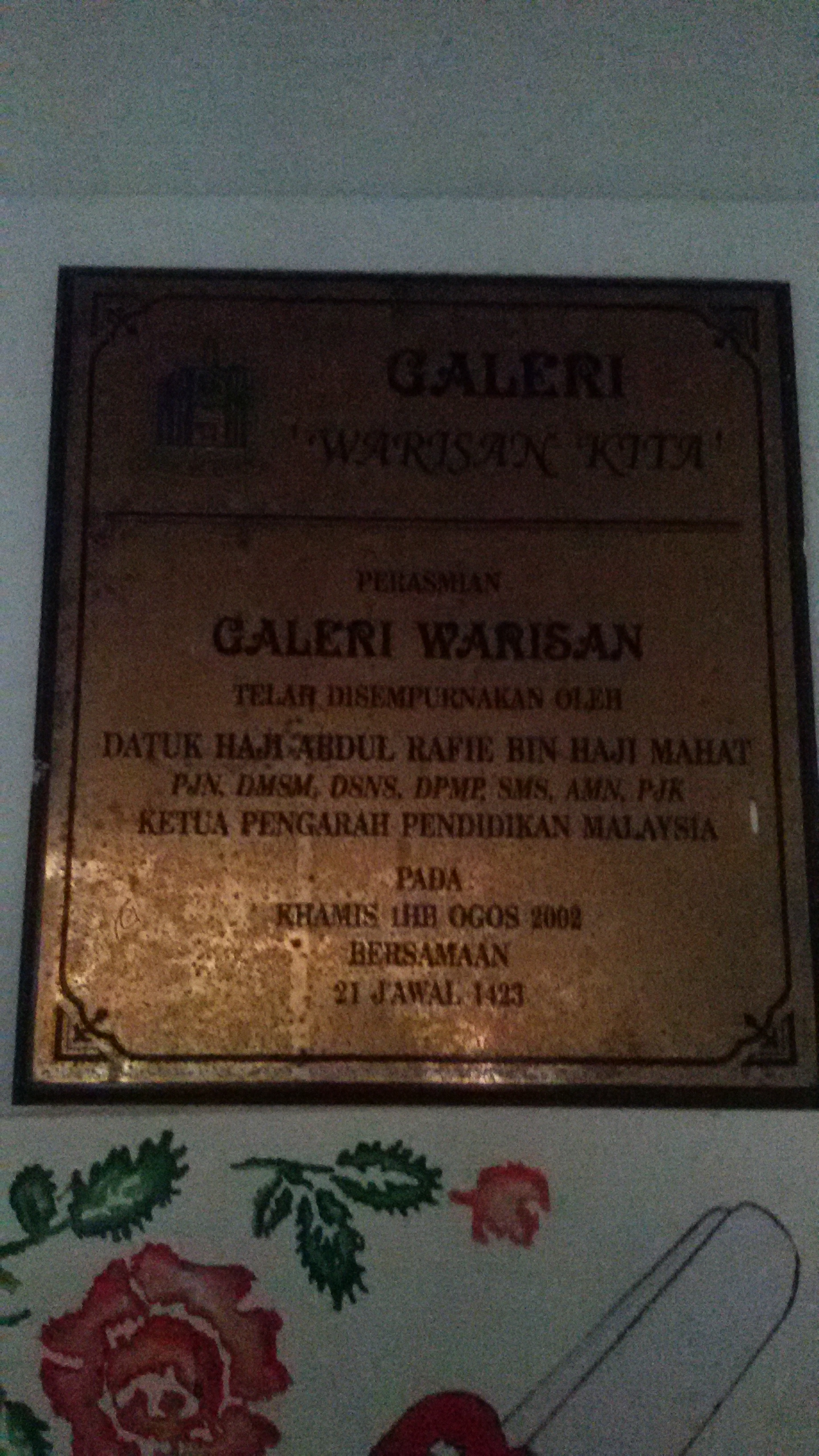 galeri warisan sejarah dirasmikan pada 1 ogos 2002